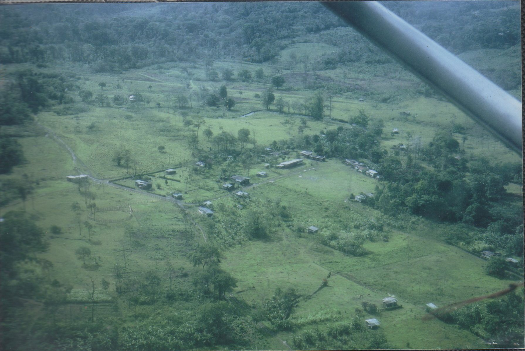 tomada de avioneta